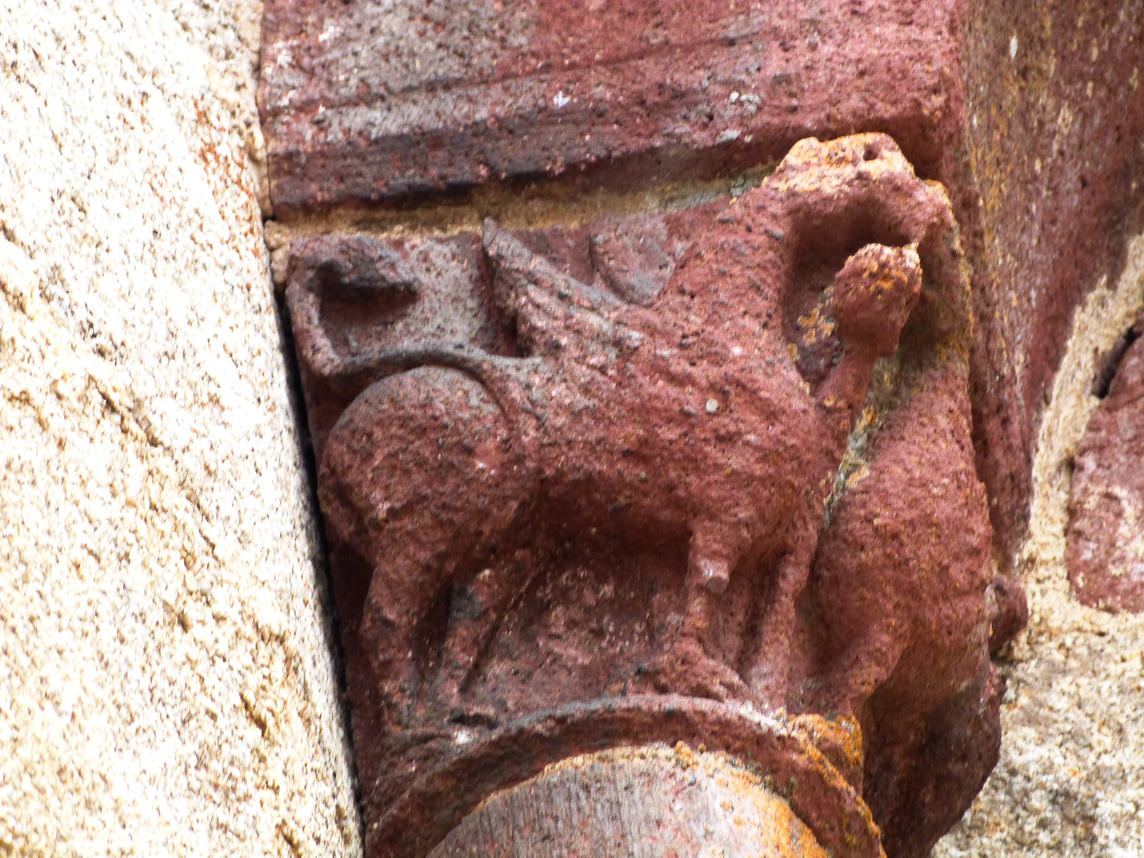 Chapiteau sculpté situé sur le chevet, à l'extérieur d'une baie séparant les absidioles.